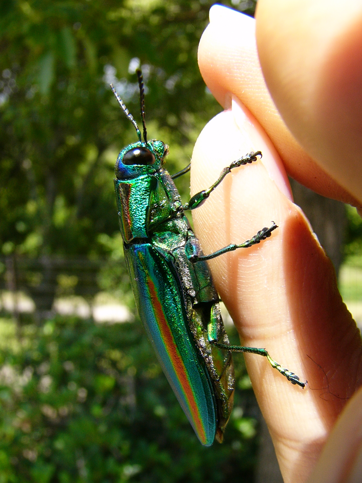 2013年8月4日愛知県知多郡東浦町於大公園内にて撮影